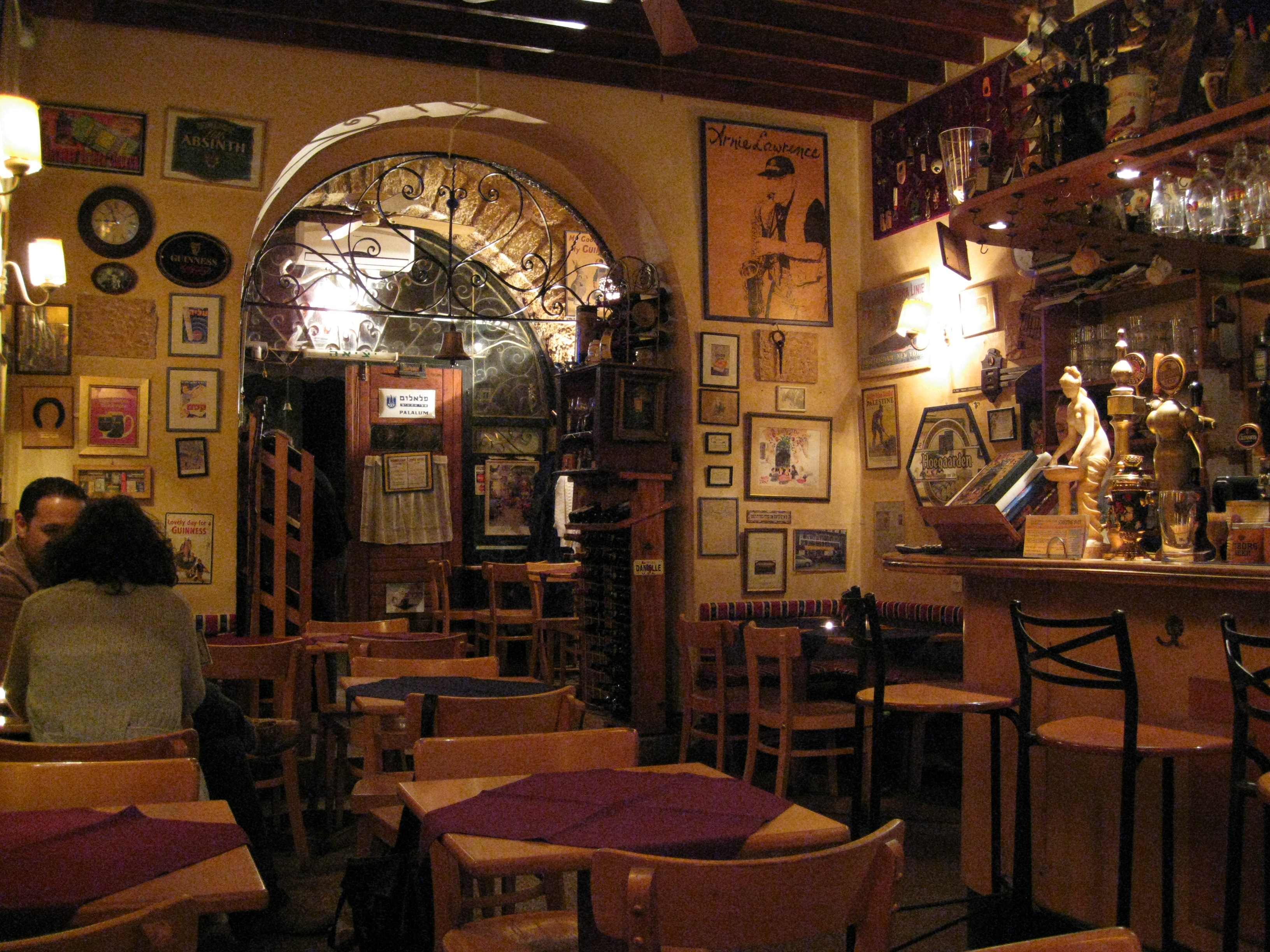 Jerusalem, Israel - Barud (or Barood) בארוד restaurant, 31 Jaffa road, FEINGOLD COURTYARD Jerusalem